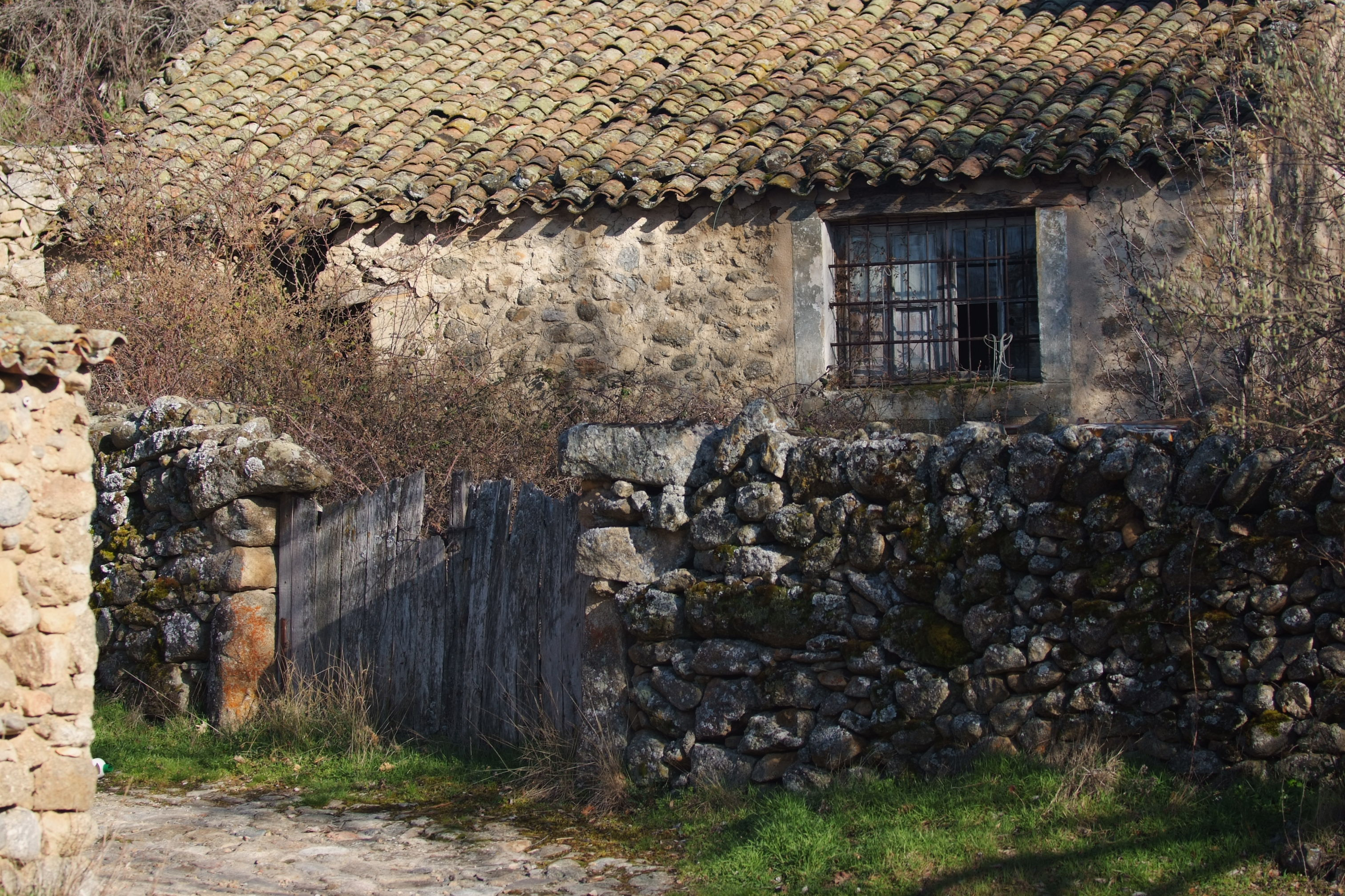 Construcción rústica en La Ribera, Villafranca de la Sierra (Ávila, Castilla y León)